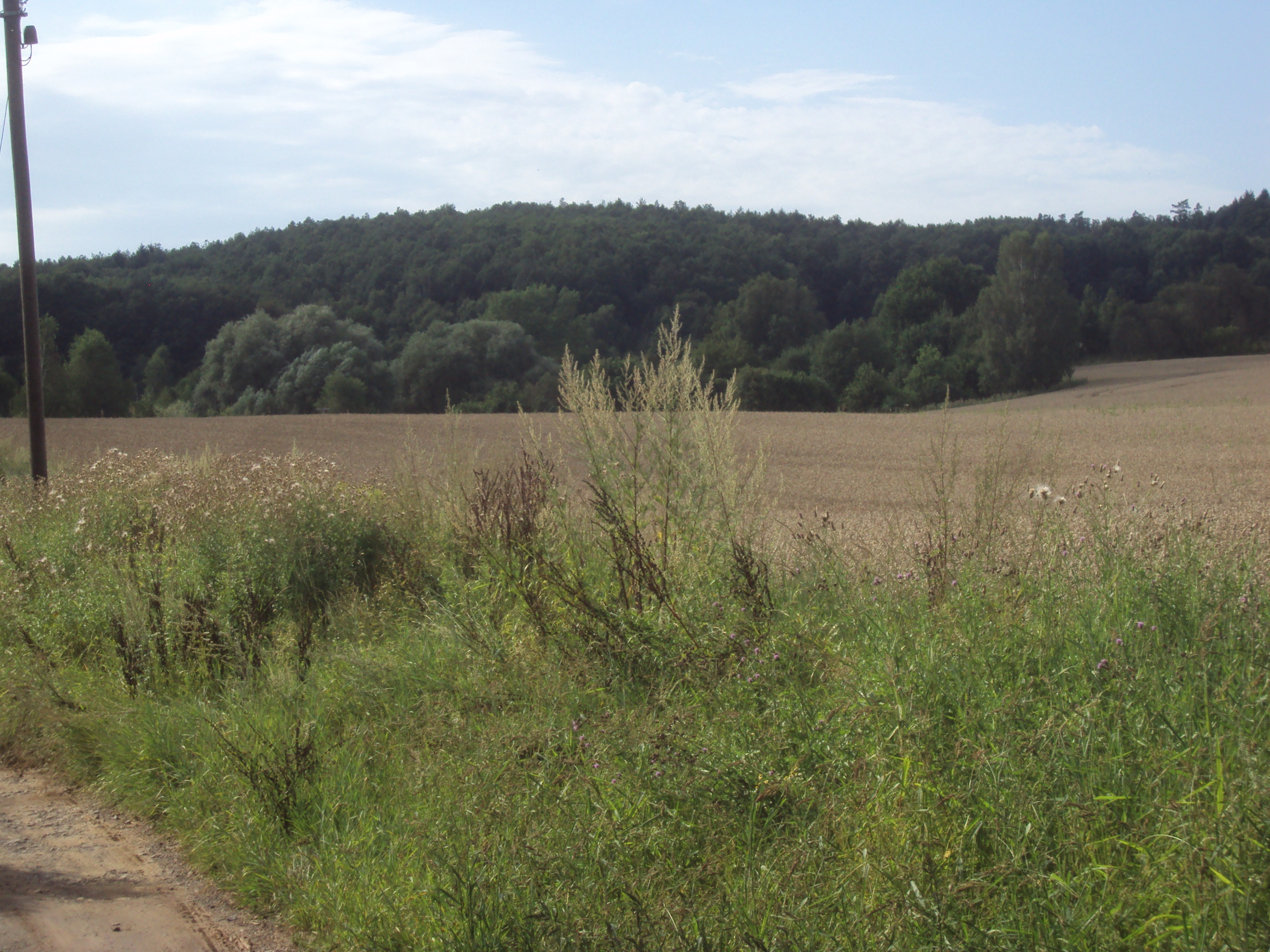 Česky: Ptačí vršek od Nových Zákup